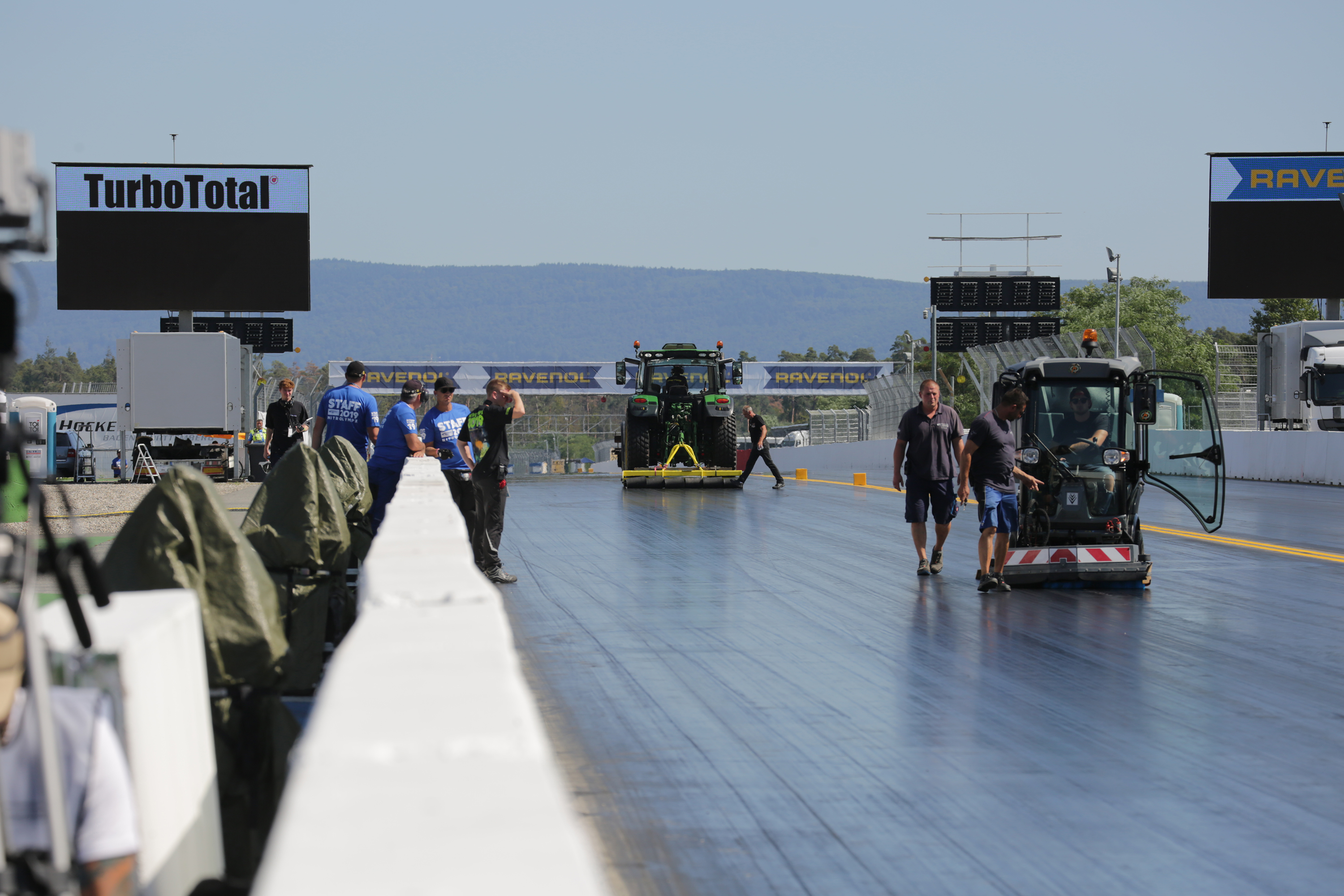 Präperation der Dragsterstrecke während der Nitrolympx 2019. Im Hintergrund zieht ein Traktor alte Rennslicks mit hohem Druck über die Strecke, im Vordergrund werden kleinere Mangen von Flüssigkeiten (z.B. Kühlwasser etc.) erst chemisch angelöst und dann abgesaugt.